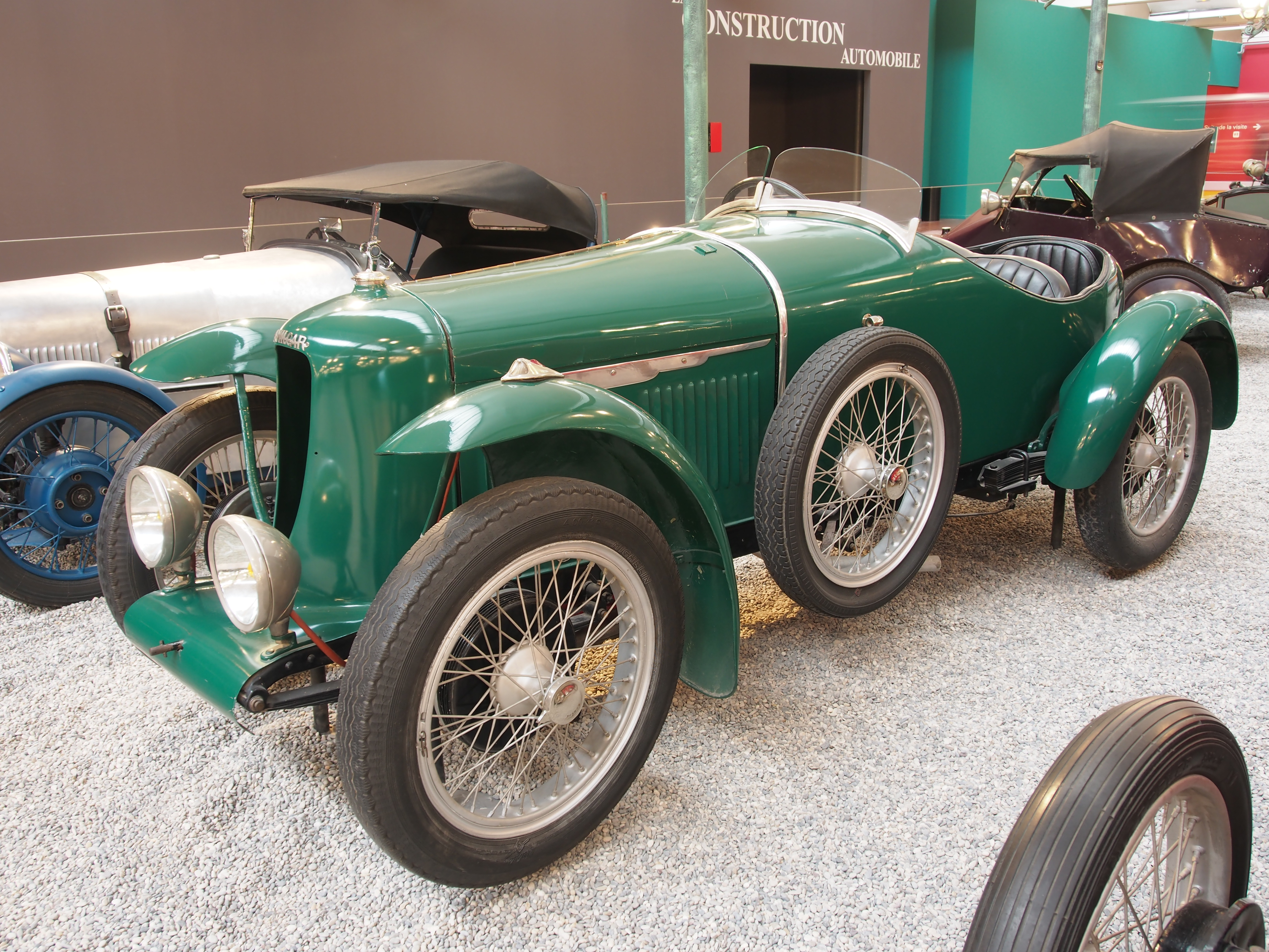 Photographed at the Cité de l’Automobile, Musée national de l’automobile, Collection Schlumpf, Mulhouse, France.